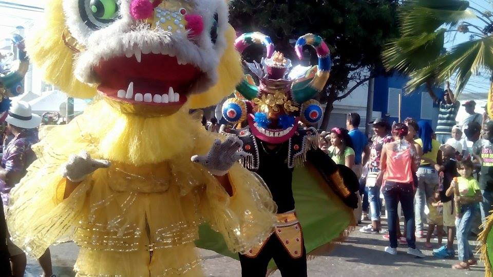 León y dragón chino en el Carnaval de Barranquilla